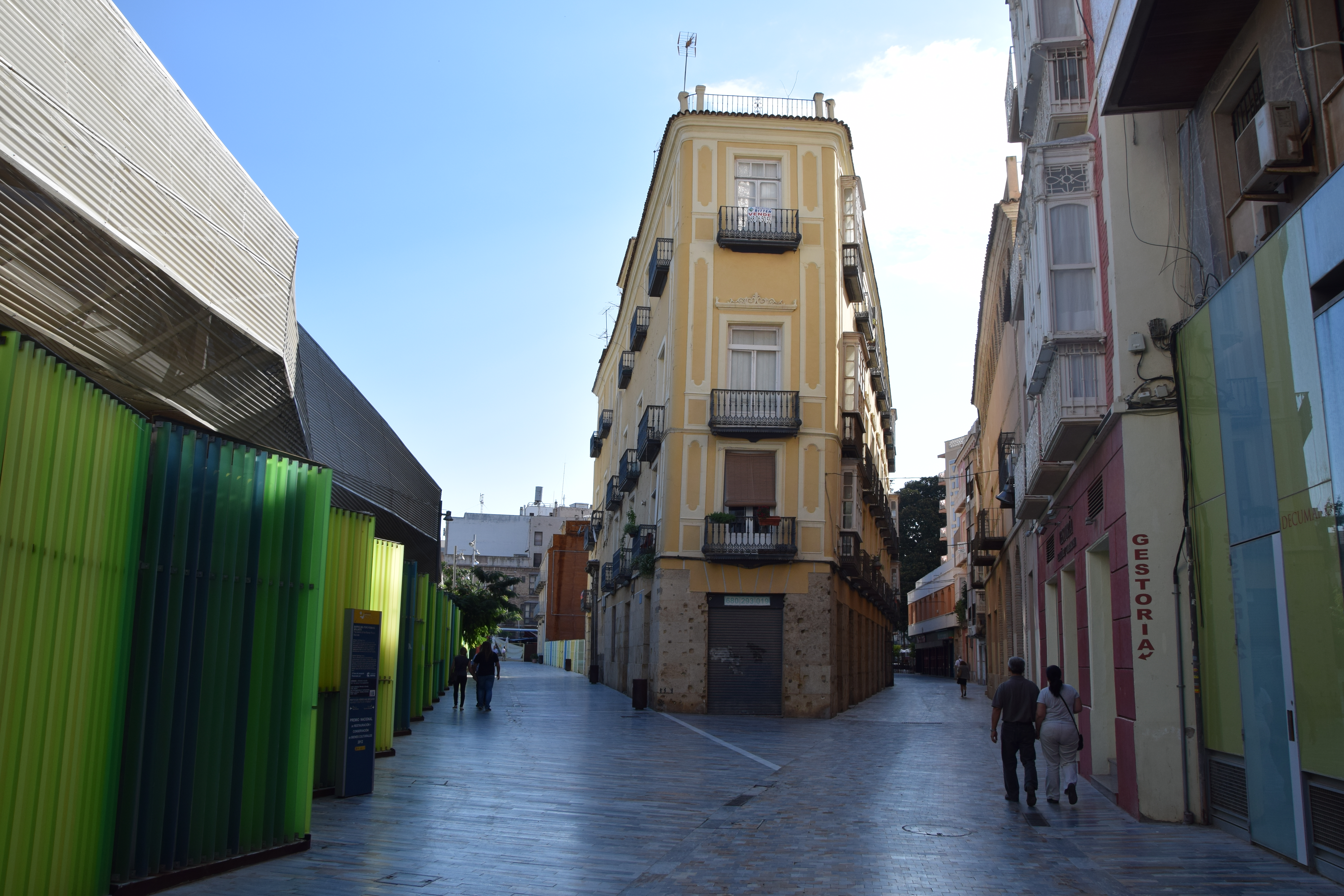 Calle del centro historico de cartagena la imagen muestra la confluencia de la calle Honda a la derecha y la de Balcones azules a la izquierda